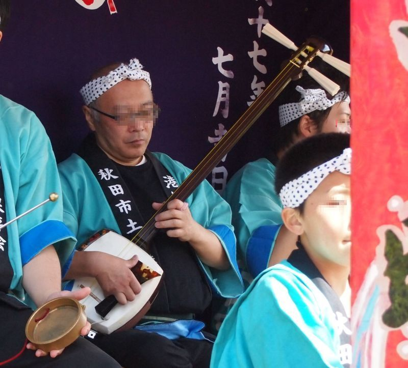 Tsuchizaki-Shinmeisha-Shrine Annual Celebration And The Float Festival (Akita City, Japan)